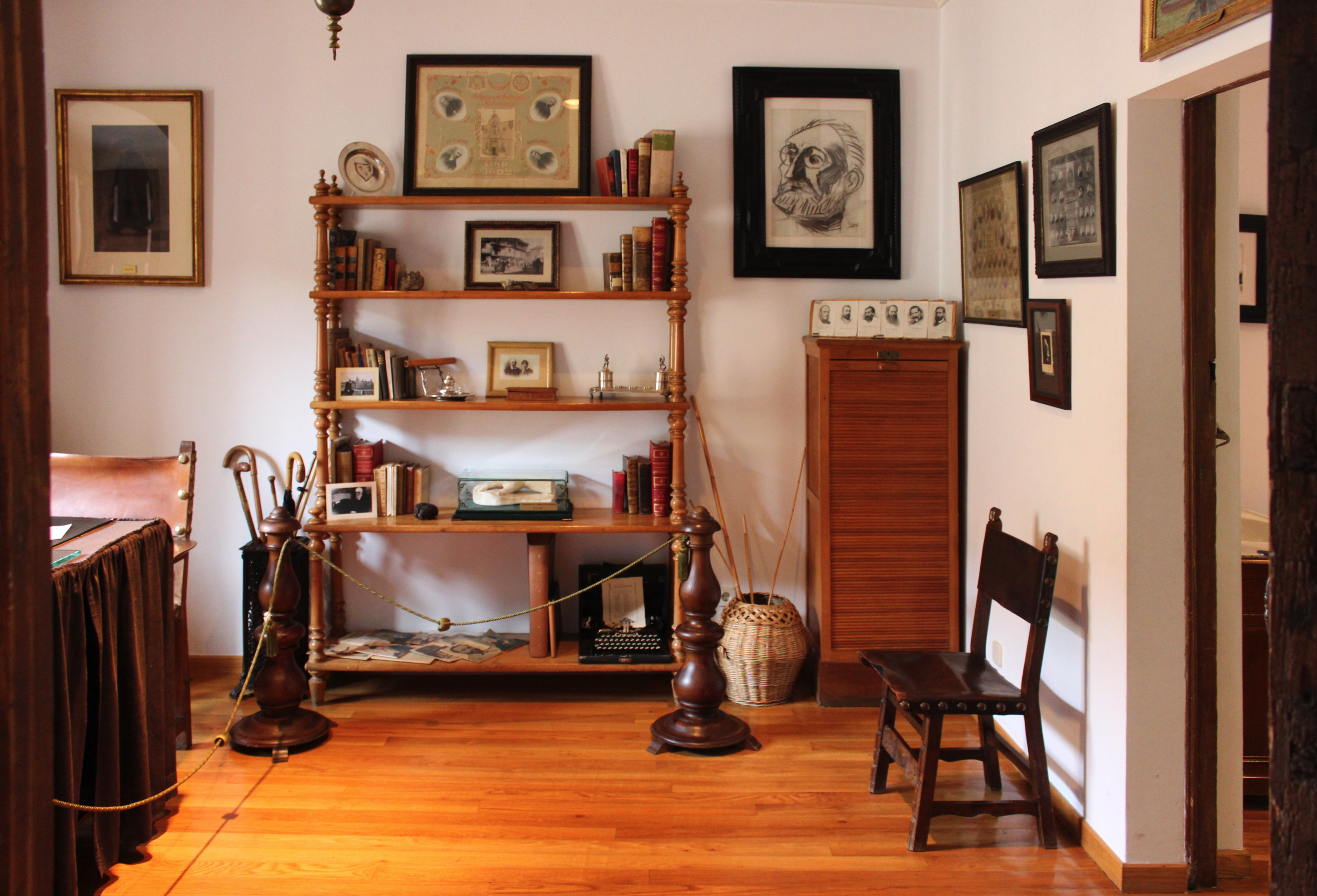 متحف ومنزل ميجيل دي أونامونو في مدينة سلامنكا الإسبانية.